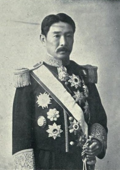 珍田捨身 ベルリン公使時代